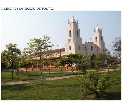 Iglesia de Tobati